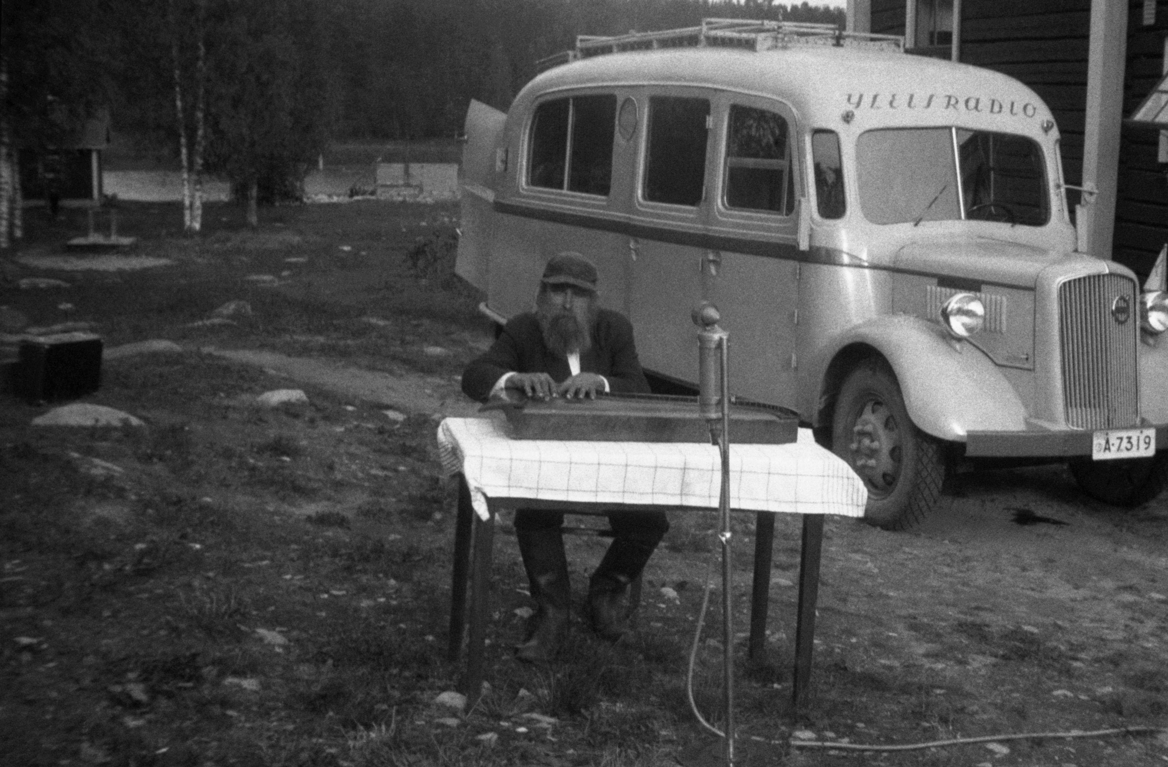 Mies soittaa kannelta, taustalla Yleisradion ensimmäinen ääniauto tapernaakkeli. Autossa oli aluksi mekaaniset levytyslaitteet, myöhemmin magneettiset. Auton kyljissä olivat kovaääniset. Kuvausaika arvioitu vuosikymmenen tarkkuudella. Tiedätkö jotain tästä kuvasta? Jätä kommentti tai ota yhteyttä sähköpostitse: Tutustu Ylen arkistosisältöihin: Fler skatter från Yles arkiv: More about Yle, the Finnish Broadcasting Company